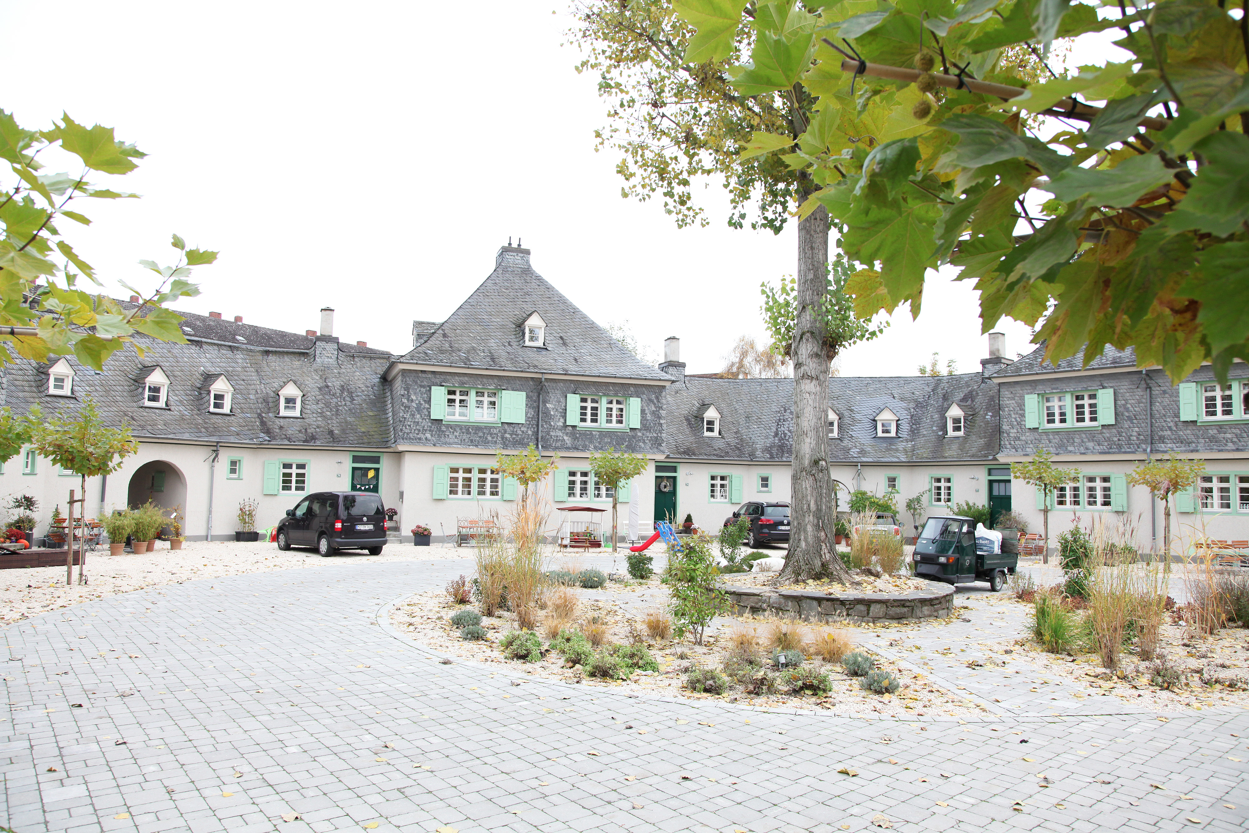 Himmelsbach-Siedlung Bingen-Kempten, Landkreis Mainz-Bingen, Rheinland-Pfalz, Deutschland